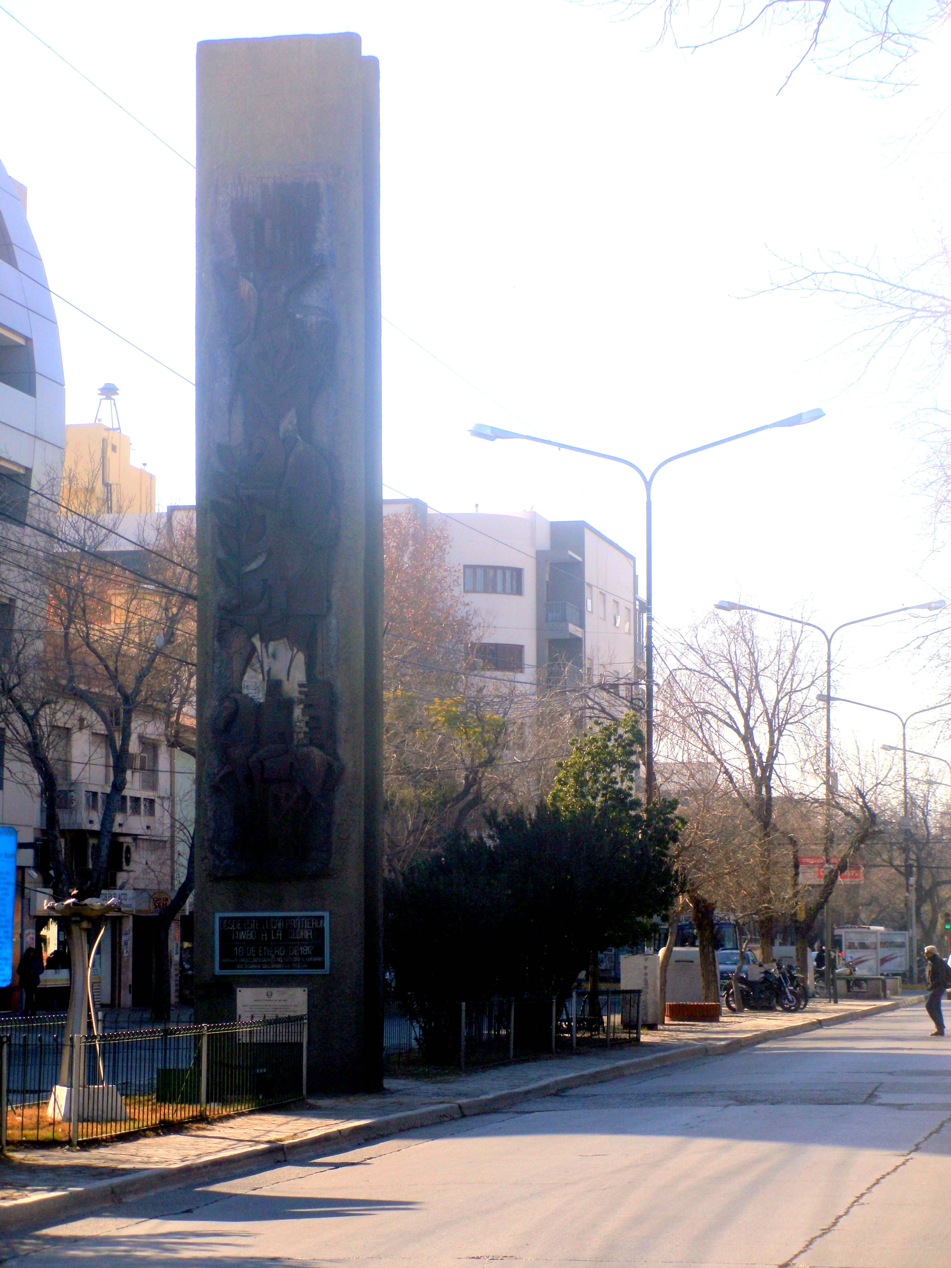 Monumento a la Columna Cabot, en la Avenida del Libertador en San Juan. Memorializa el punto de partido de una de las divisiones del ejército que partió en 1817 bajo el mando del Teniente Coronel Juan Manuel Cabot al cruce de la cordillera.